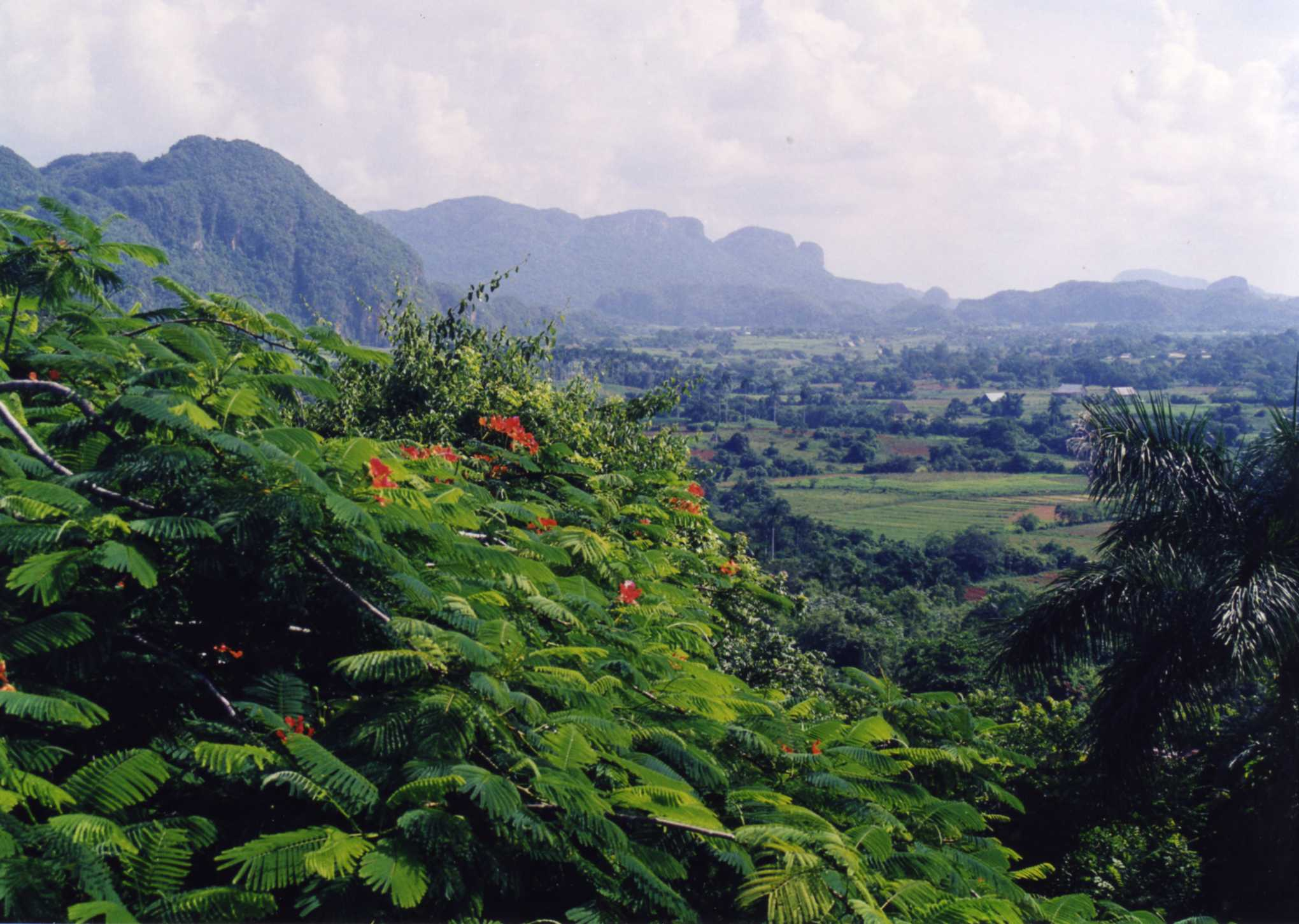 Valle de Viñales (Cuba)